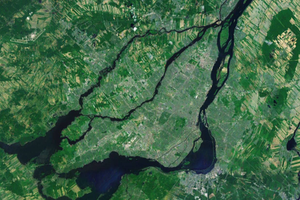 Vue de l'Archipel d'Hochelaga par satellite